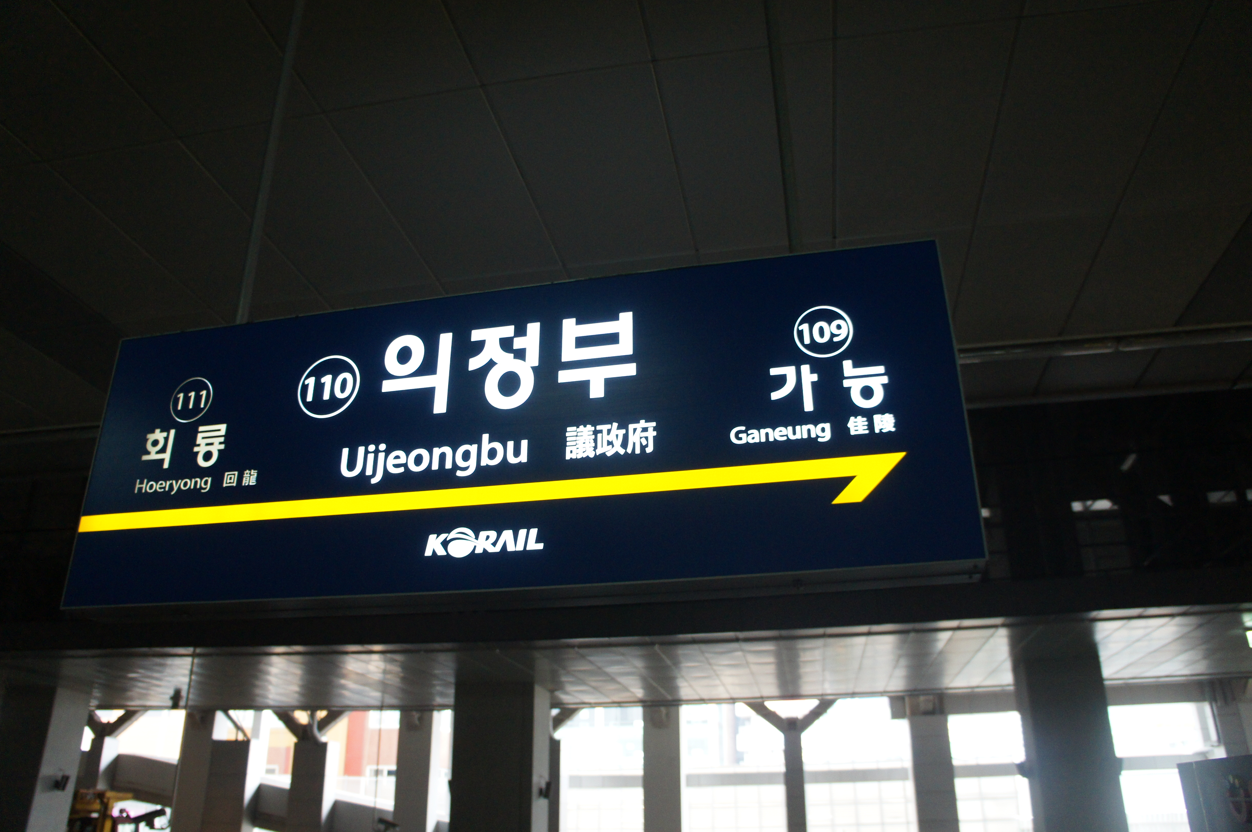 의정부역 역명판